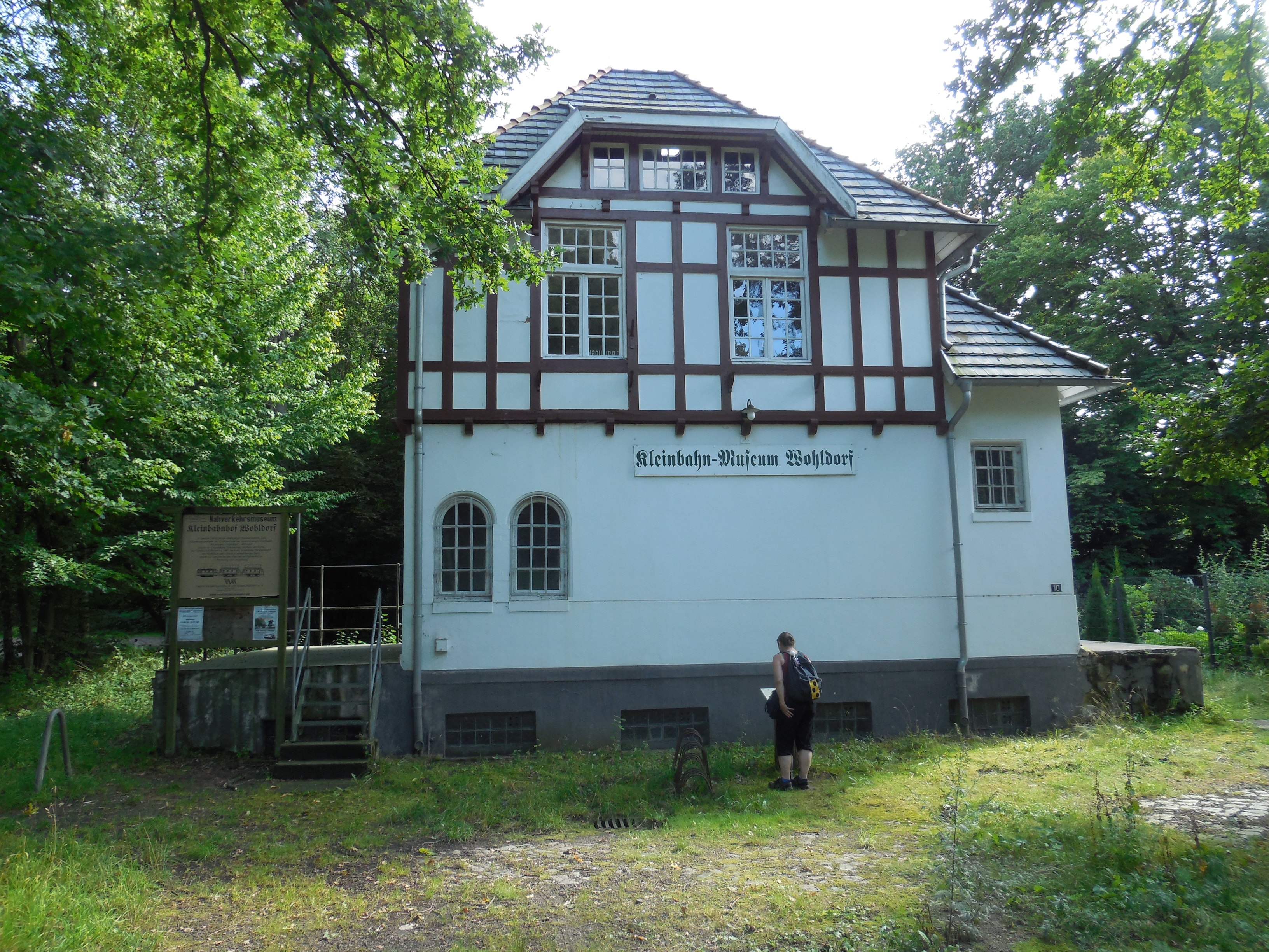 Kleinbahn Altrahlstedt - Wohldorf, Güterannahme- und Ausgabestelle Endbahnhof Wohldorf 2016